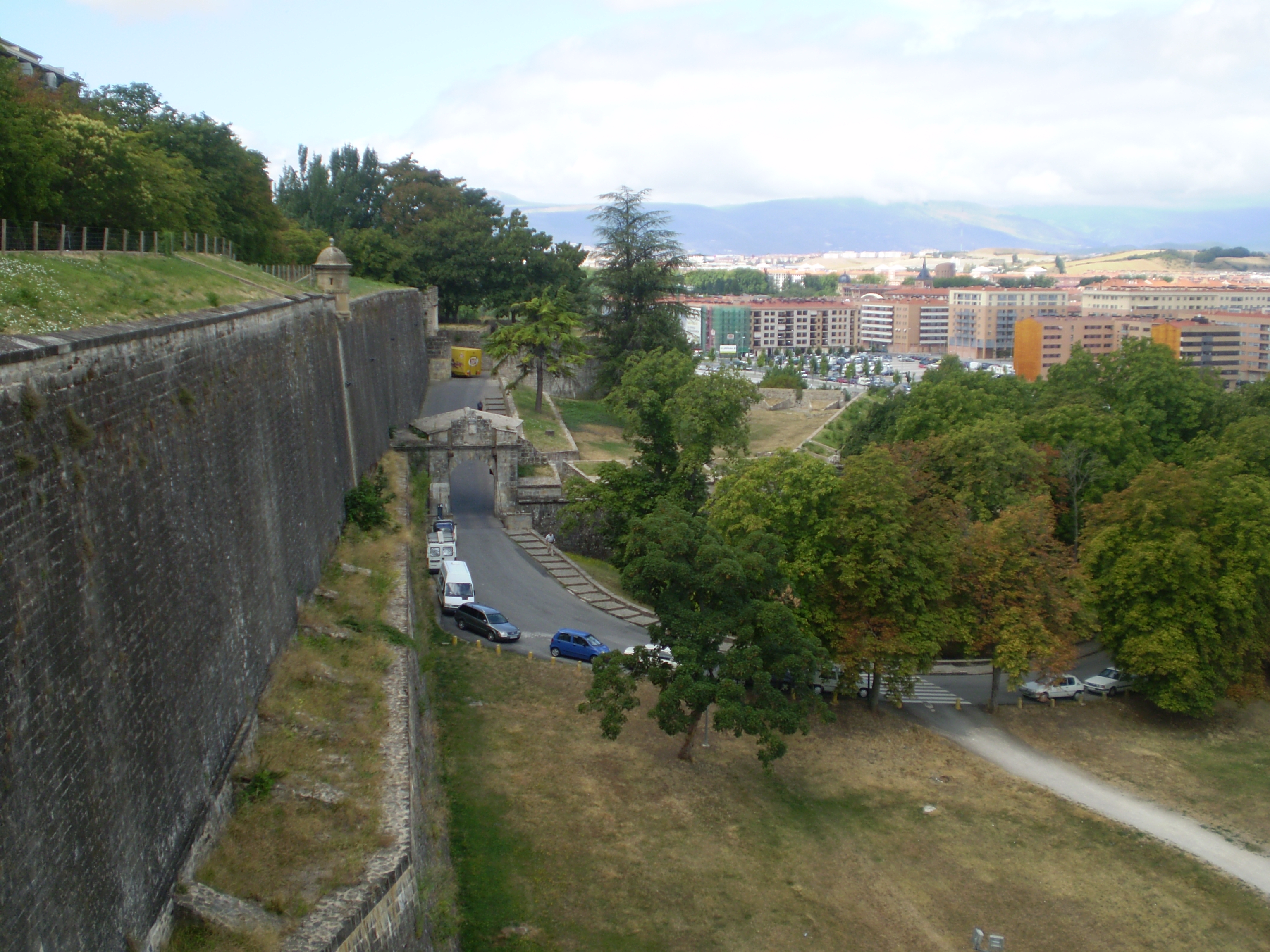 Vista del Portal de Francia de Pamplona desde el mirador del Baluarte de Redín